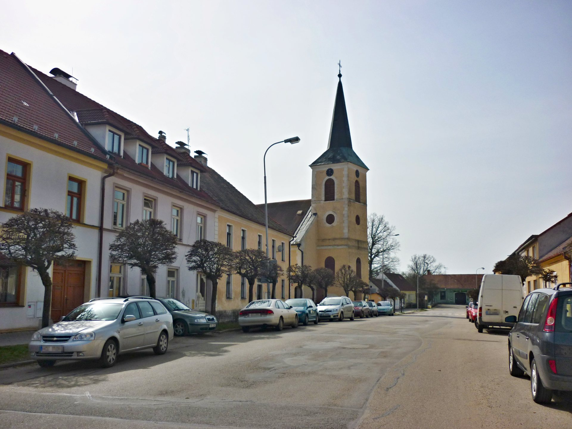 Nová Včelnice, Masarykovo náměstí